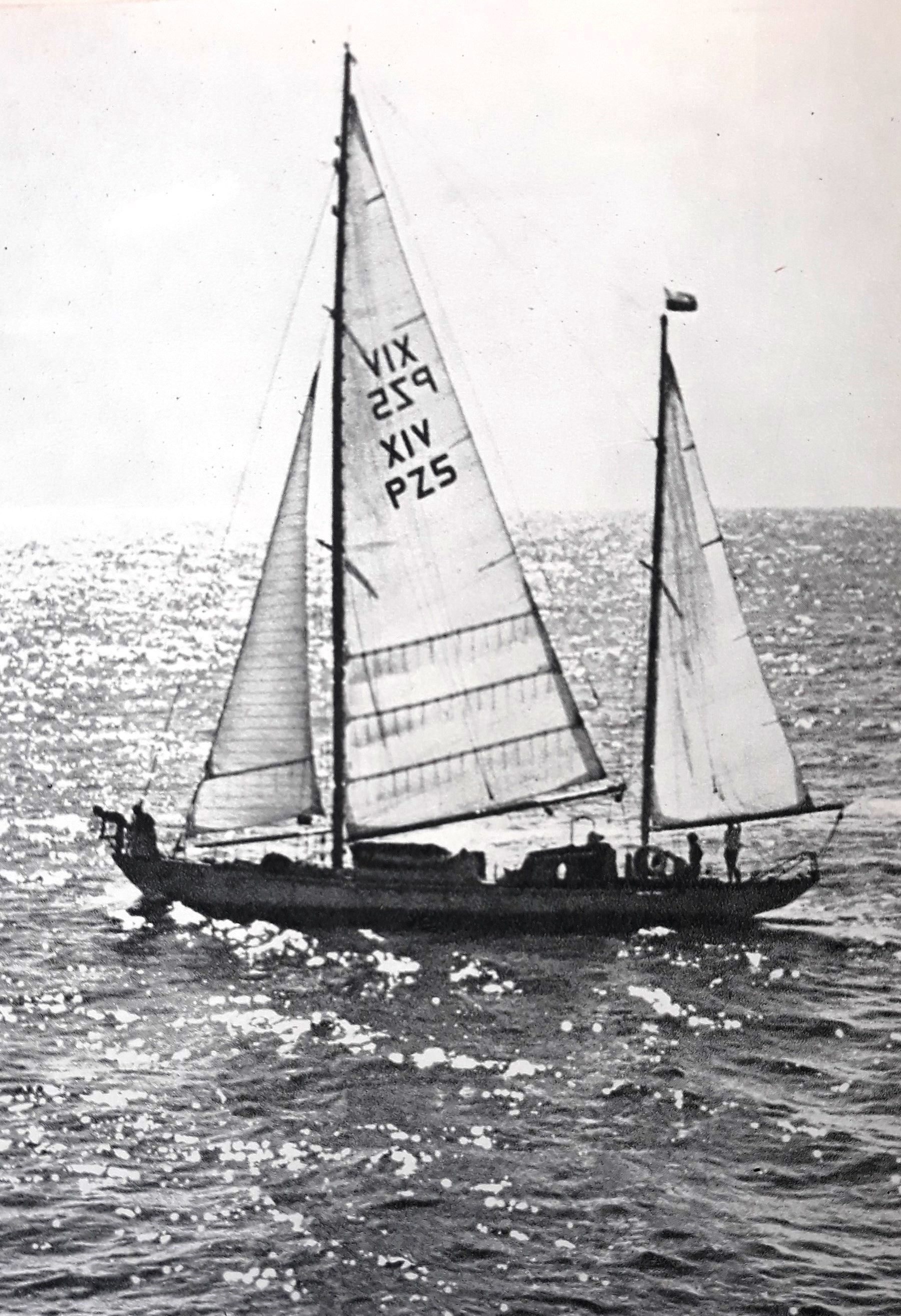 "Śmiały" pod żaglami na oceanie